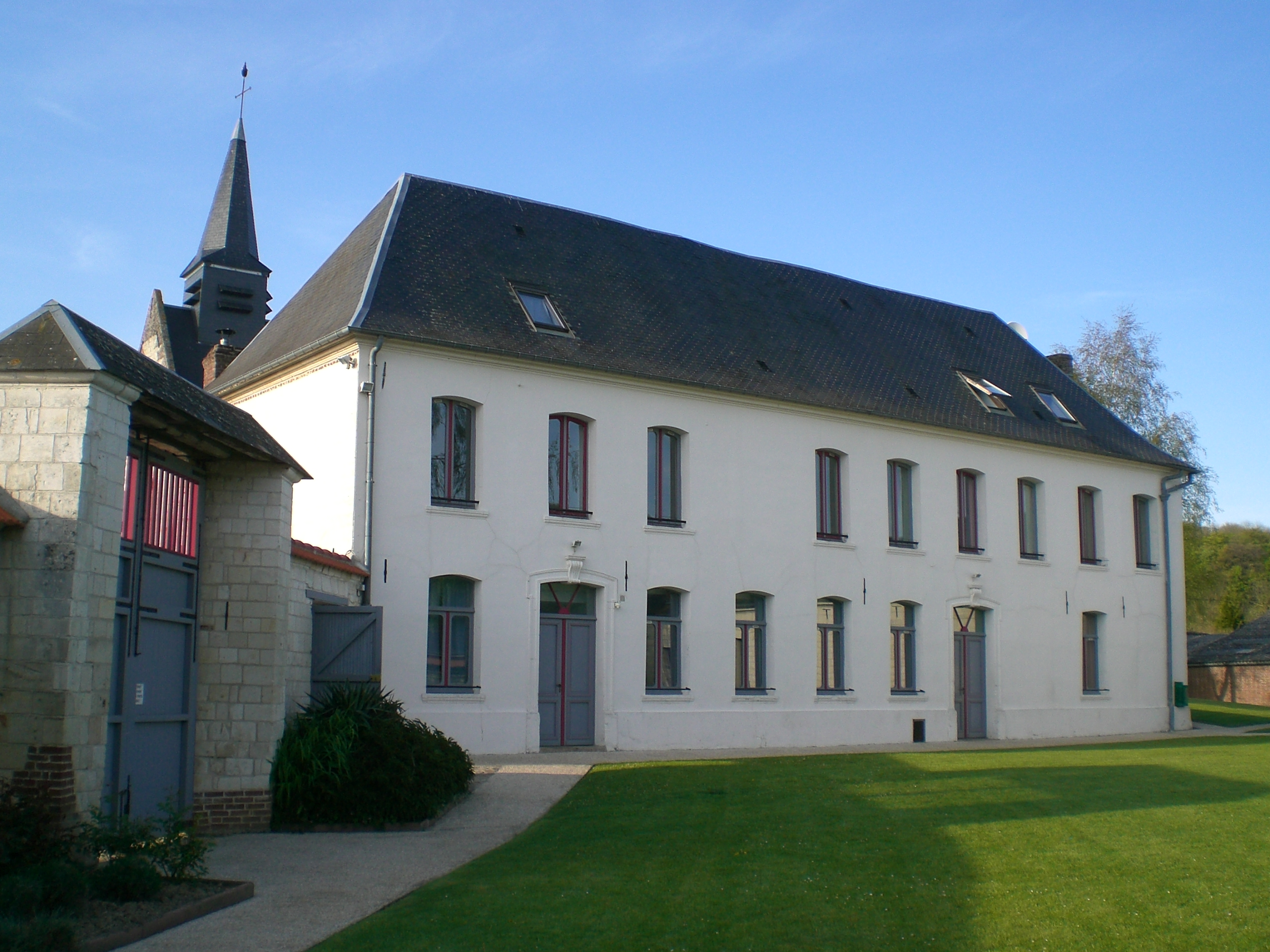 Authie (Somme) en avril 2014